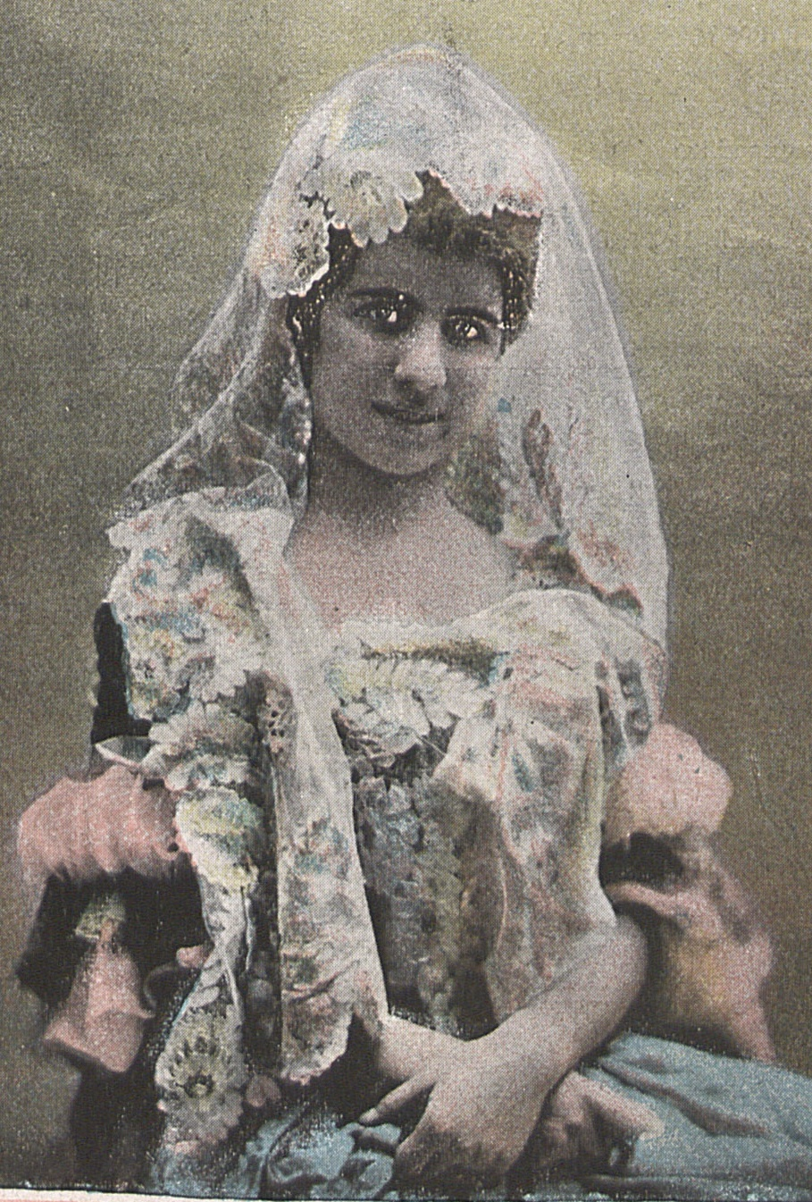 Excma. Sra. Marquesa de Ayerbe. Inst. de Alviach (Madrid)